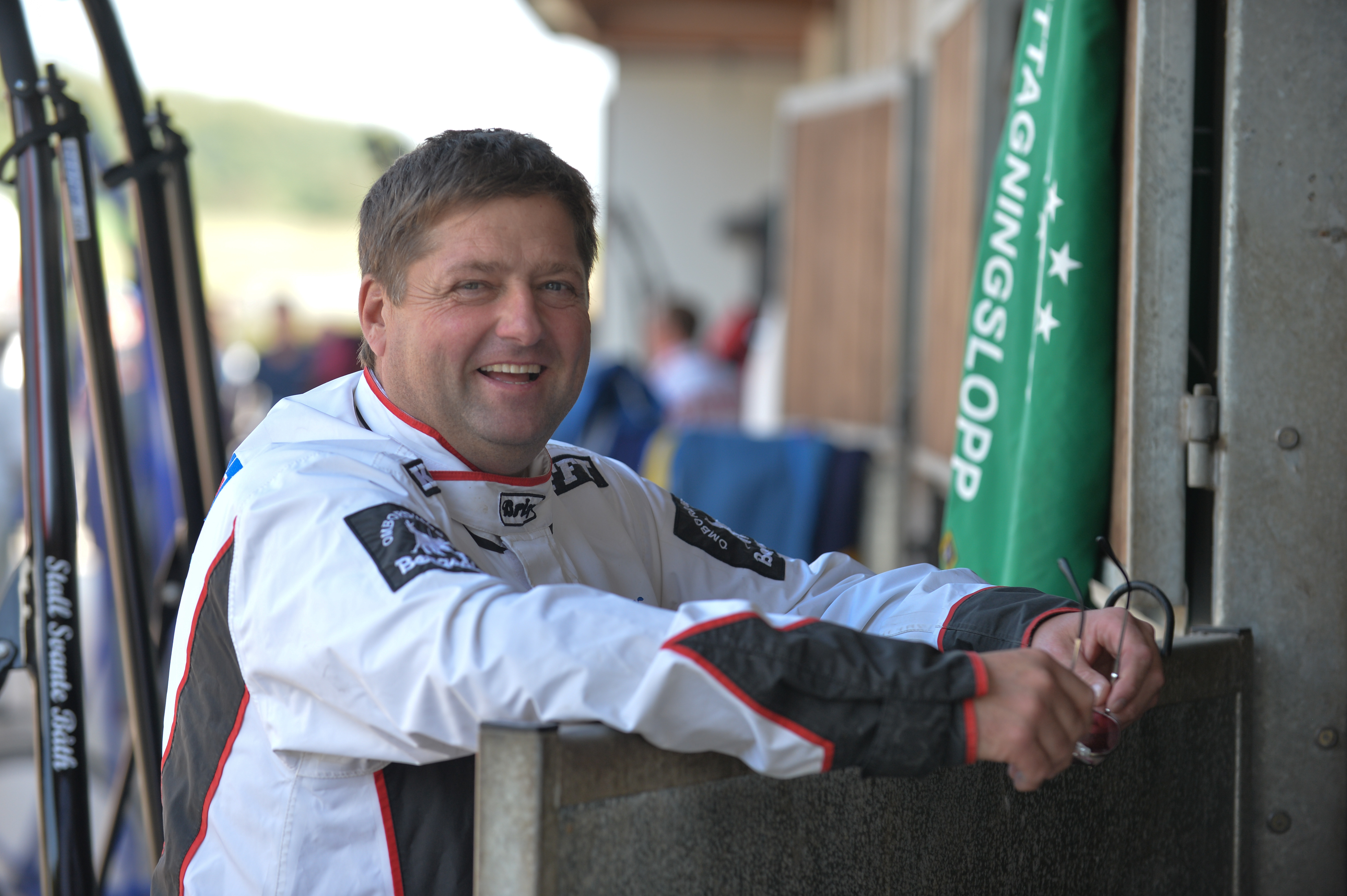 Travkusken Svante Båth.